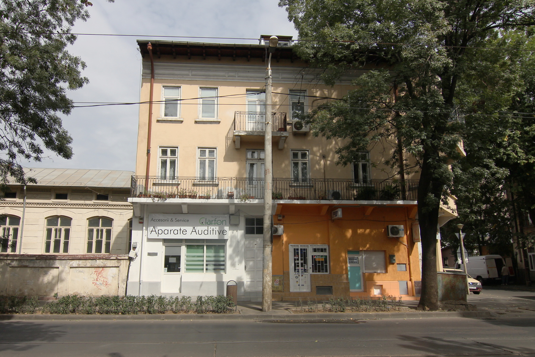 Casă pe Dudești